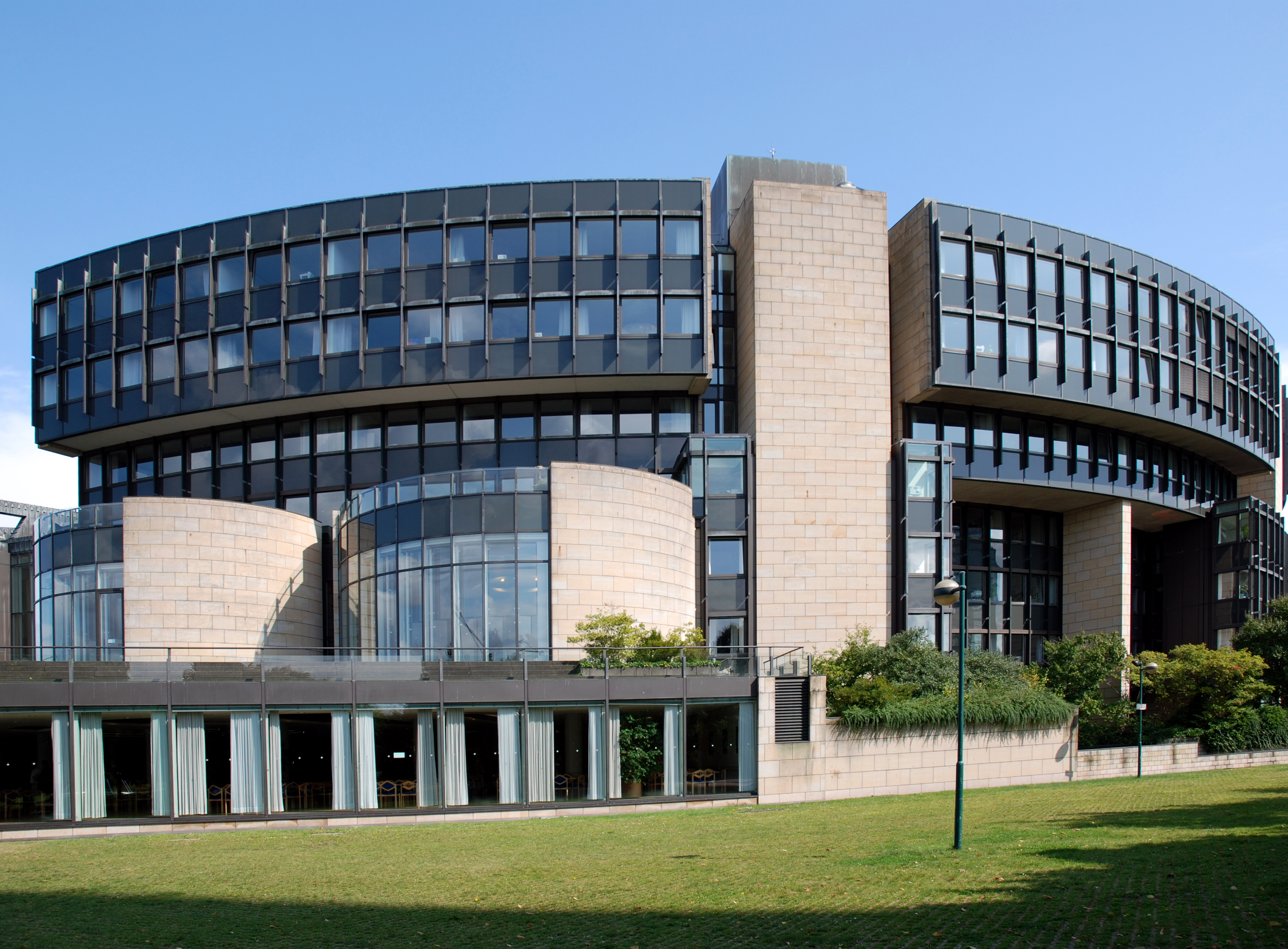 Северный Рейн-Вестфалия, Дюссельдорф – ландтаг СРВ